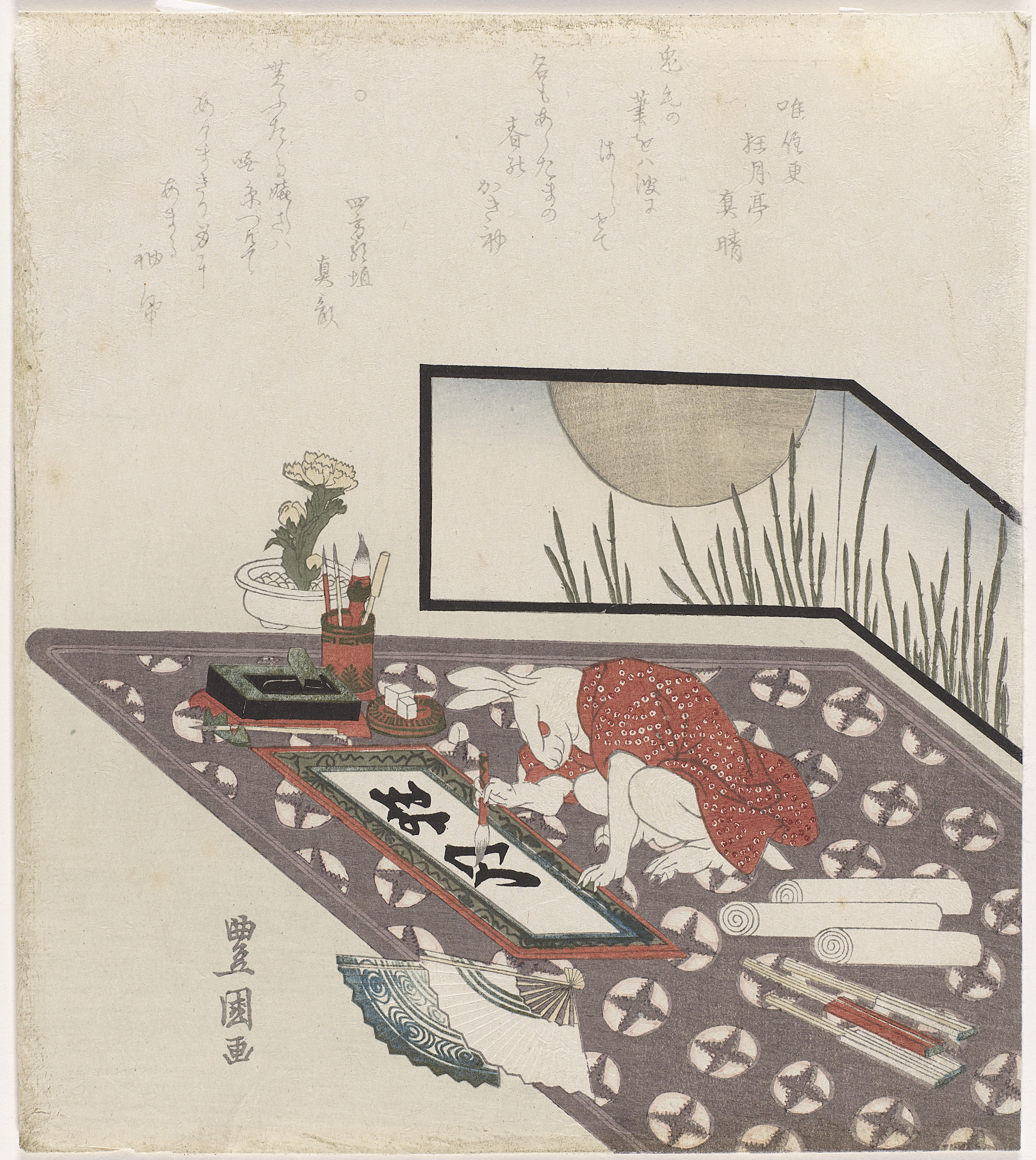 Haas in kimono gezeten op een tatami calligrafeert een rol papier met een wens voor het nieuwe jaar. Label Line: Toyokuni (I) , Utagawa (1769 - 1825), 1819, houtsnede Collection: prenten; Japan (collectie)